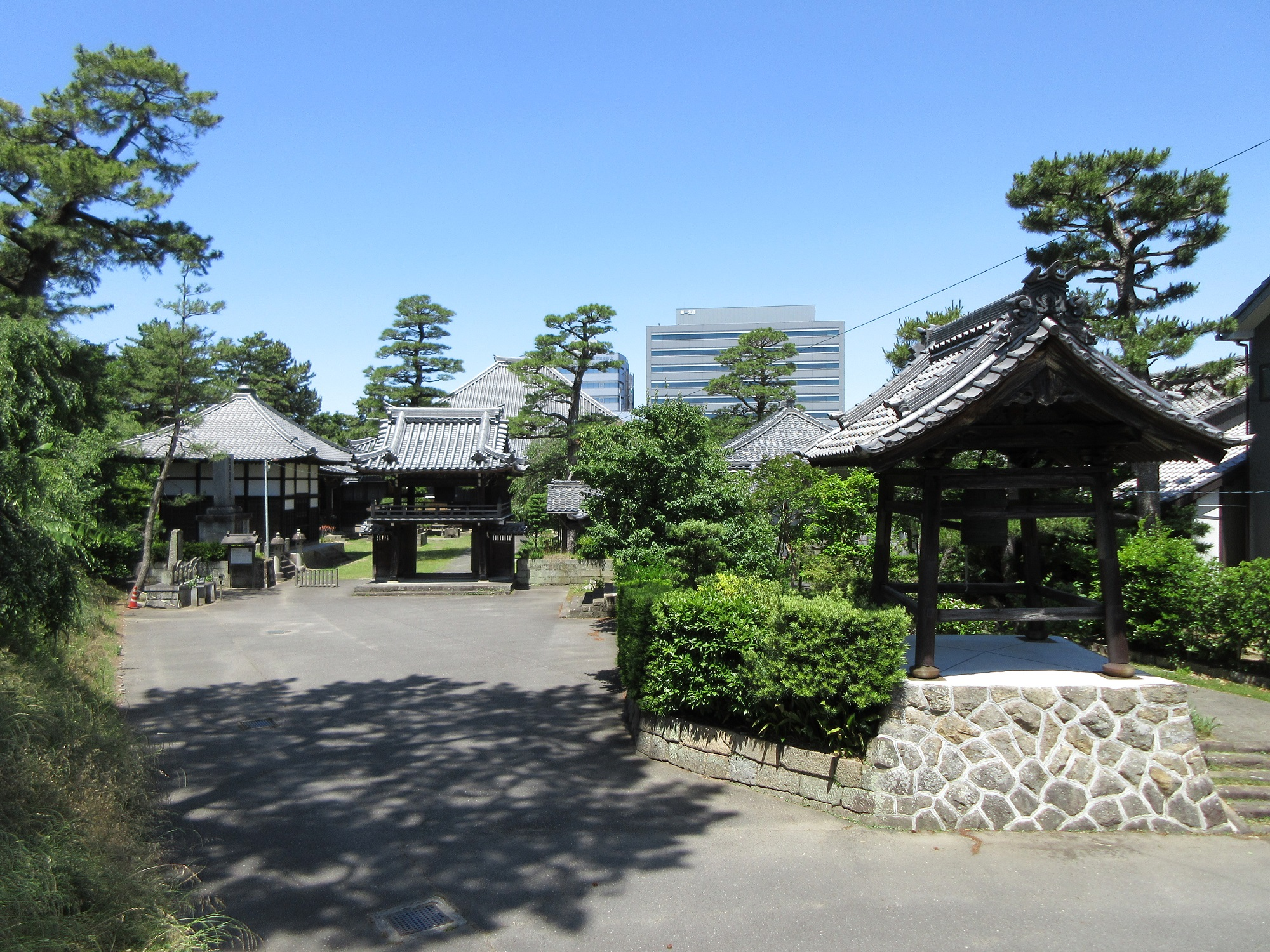 満性寺（岡崎市菅生町）